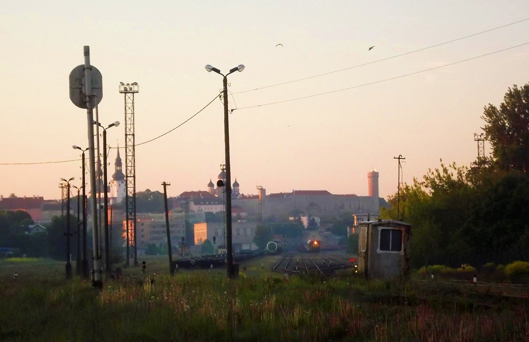 Kopli kaubajaam vaatega Toompeale.